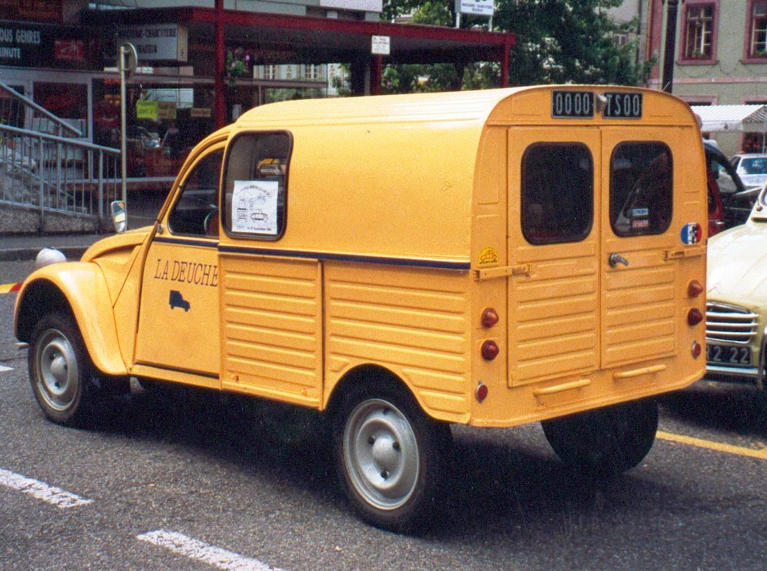 cliché personnel véhicule dérivés de la 2cv. Reprenant principalement la plateforme et la mécanique.les plaques d'immatriculation ont volontairement été masquées. Restauration conforme d'un véhicule des PTT (le monogramme ne pouvait cependant pas être repris). catégorie:2CV